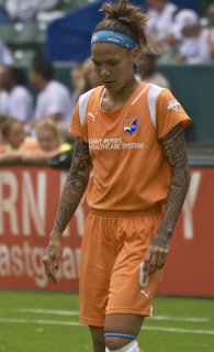 Natasha Kai.